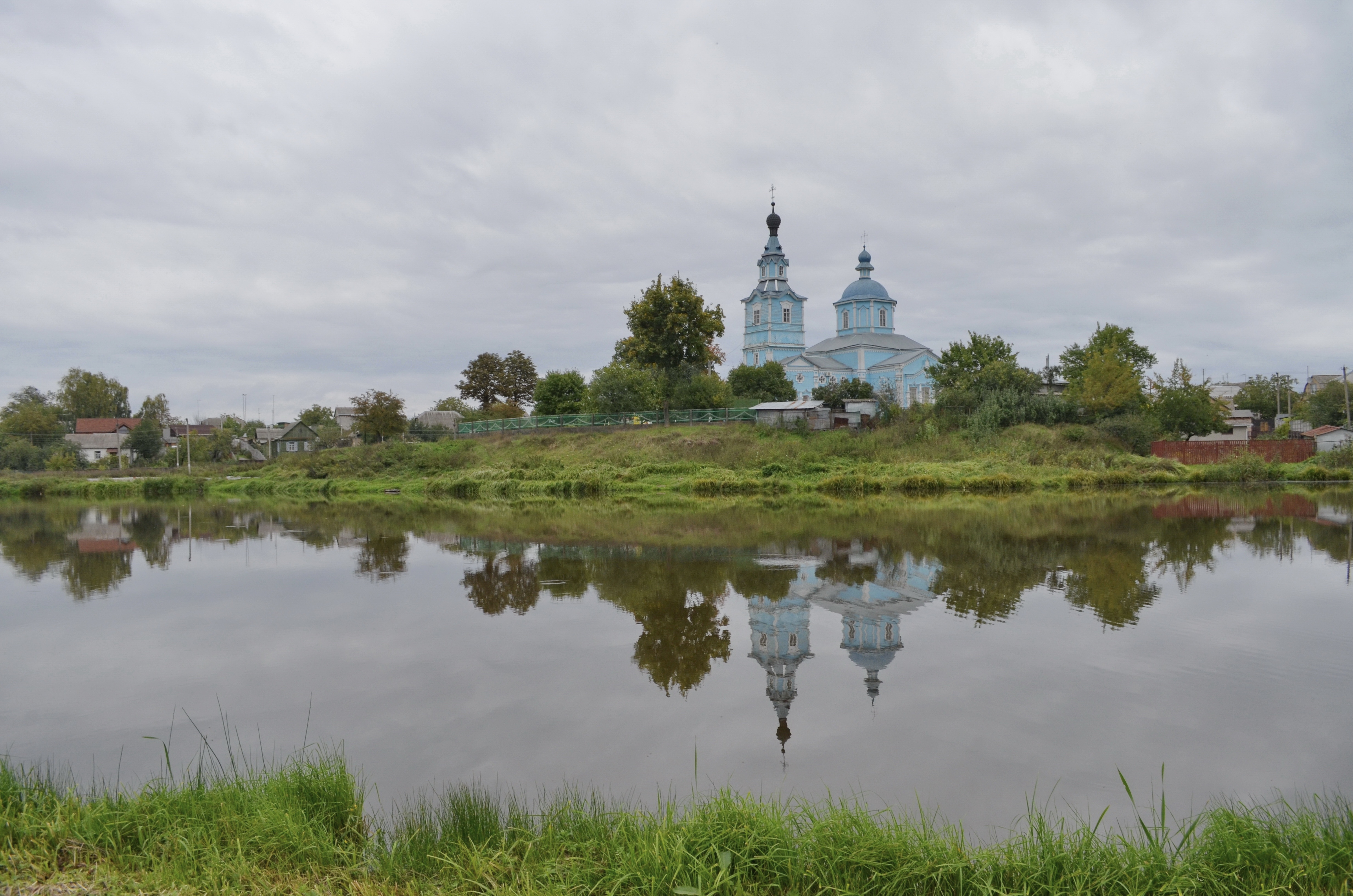 Михайлівська церква (дер., обл. цеглою), Боярка, вул. Івана Франка, 4